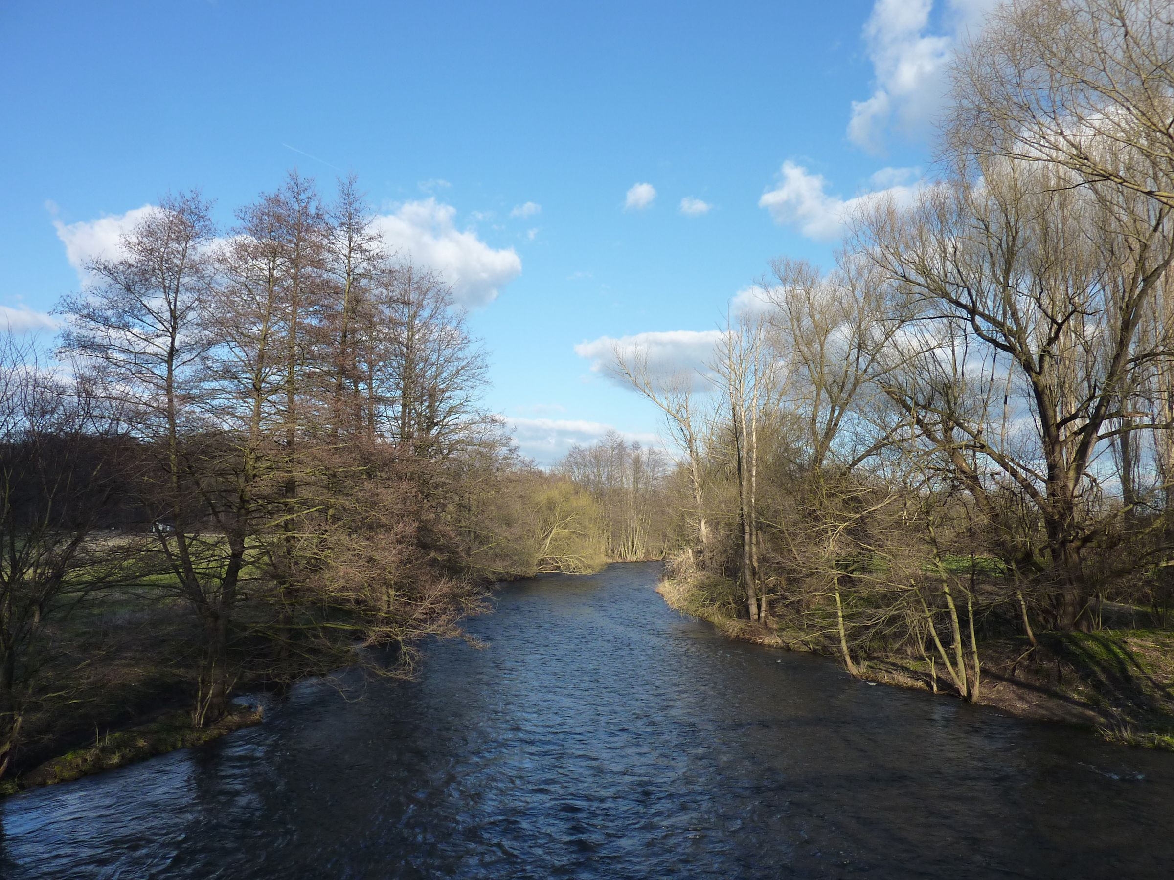 Bode